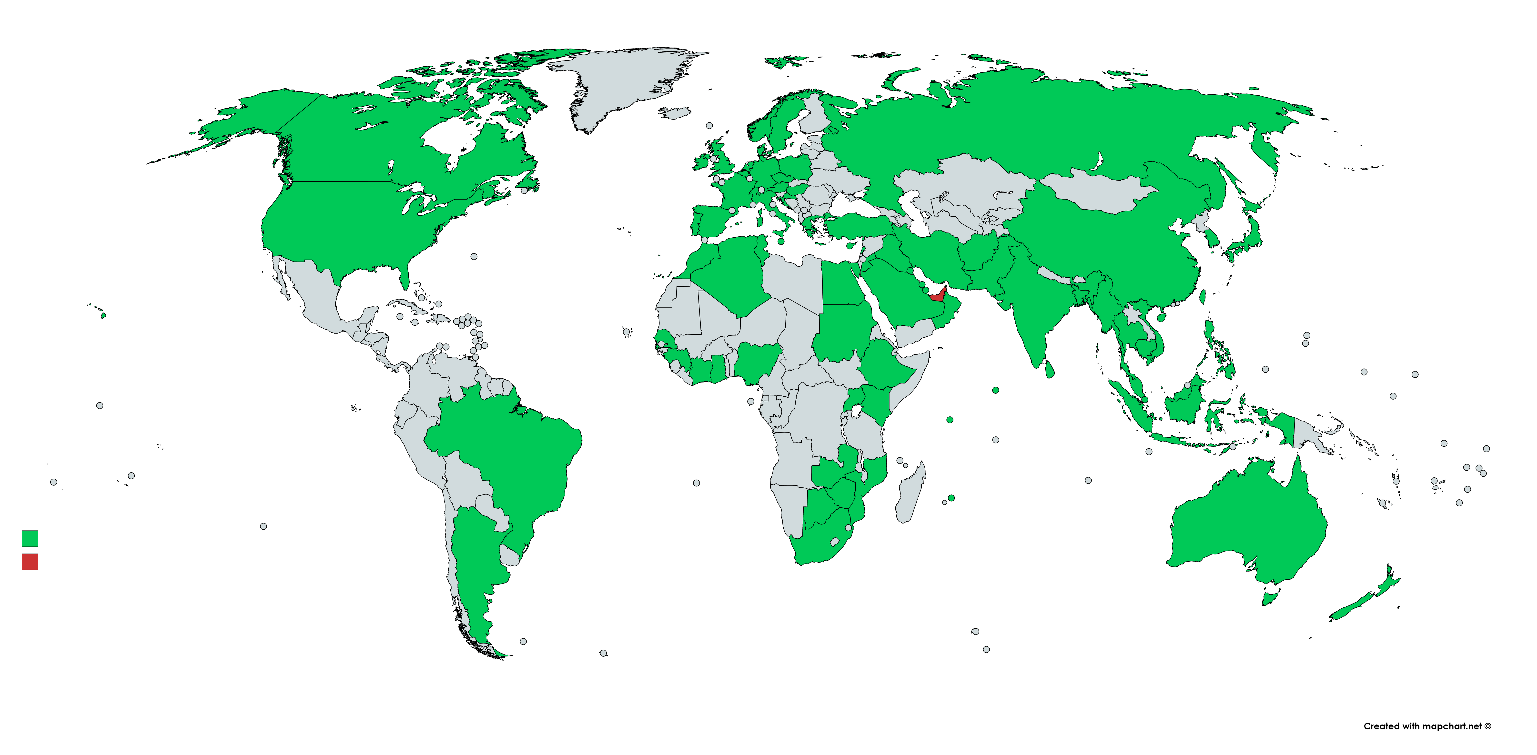 Emirates